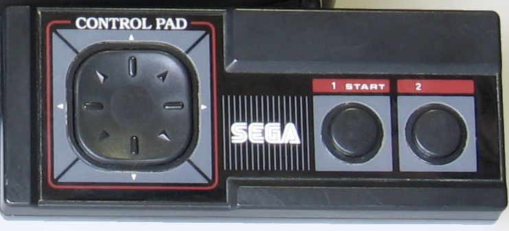 Mando Master System 2